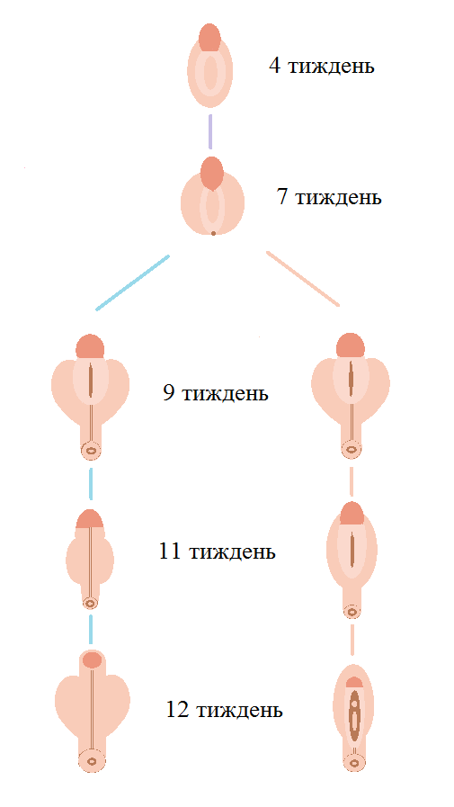 Малюнок, що показує розвиток статевого горбка чоловічого і жіночого ембріонів по тижнях.